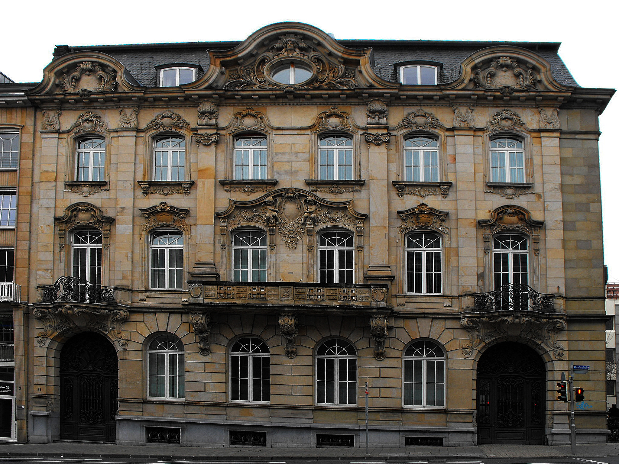 Bankhaus Suermondt, erbaut von Eduard Linse, um 1900